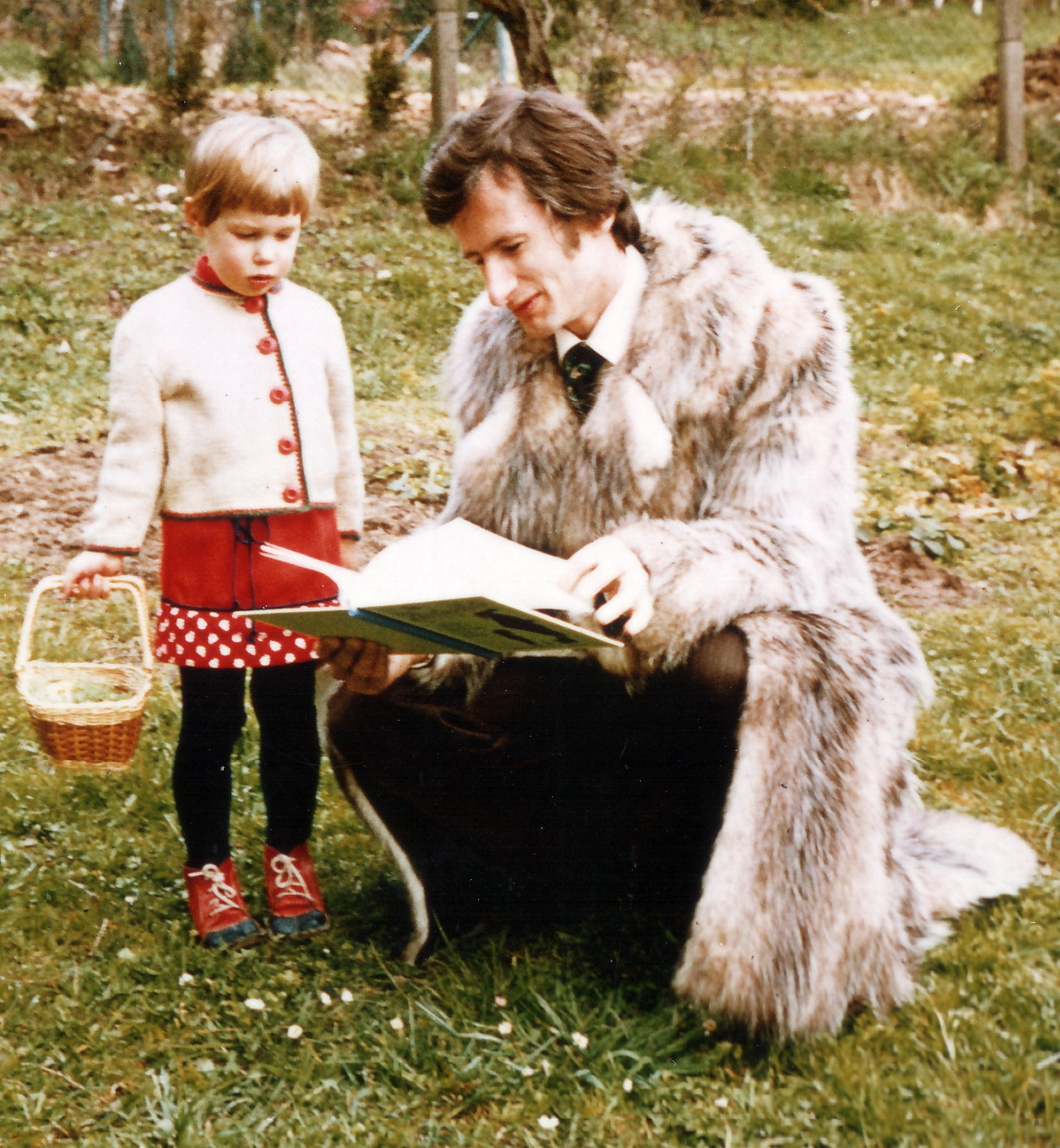 Herrenmantel aus naturfarbenem Amerikanisch Opossumfell. Ostern 1977.